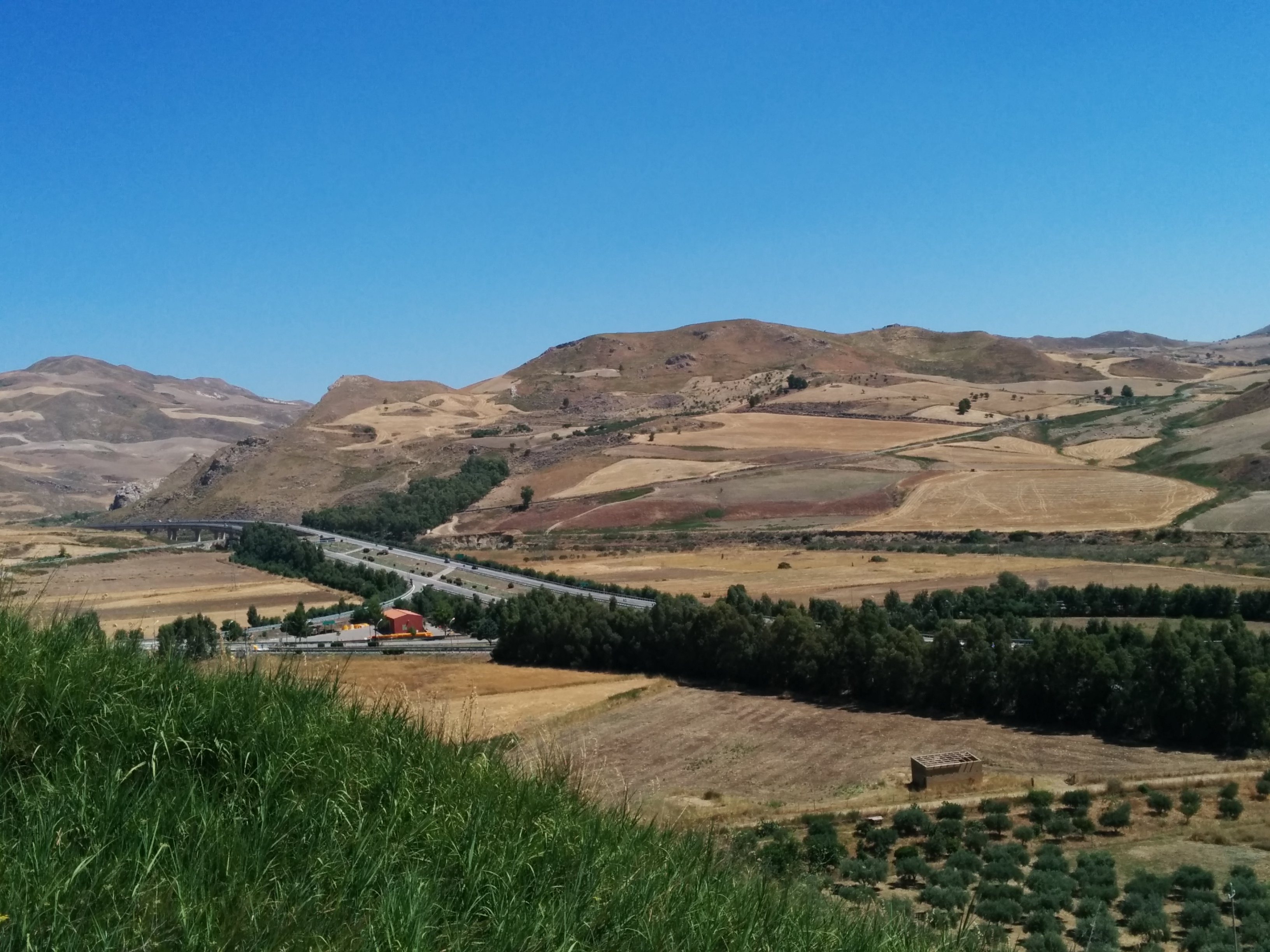 Veduta panoramica dell'uscita "Ponte Cinque Archi" sull'autostrada A19